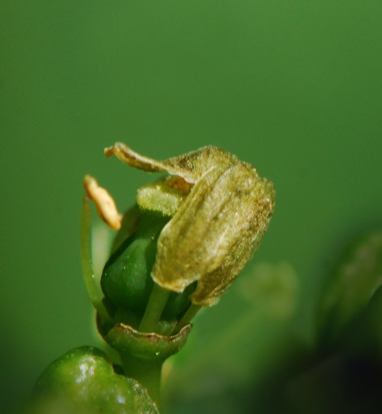 Vitis vinifera, fleur, coiffe, Boutiers 16 (Fr)